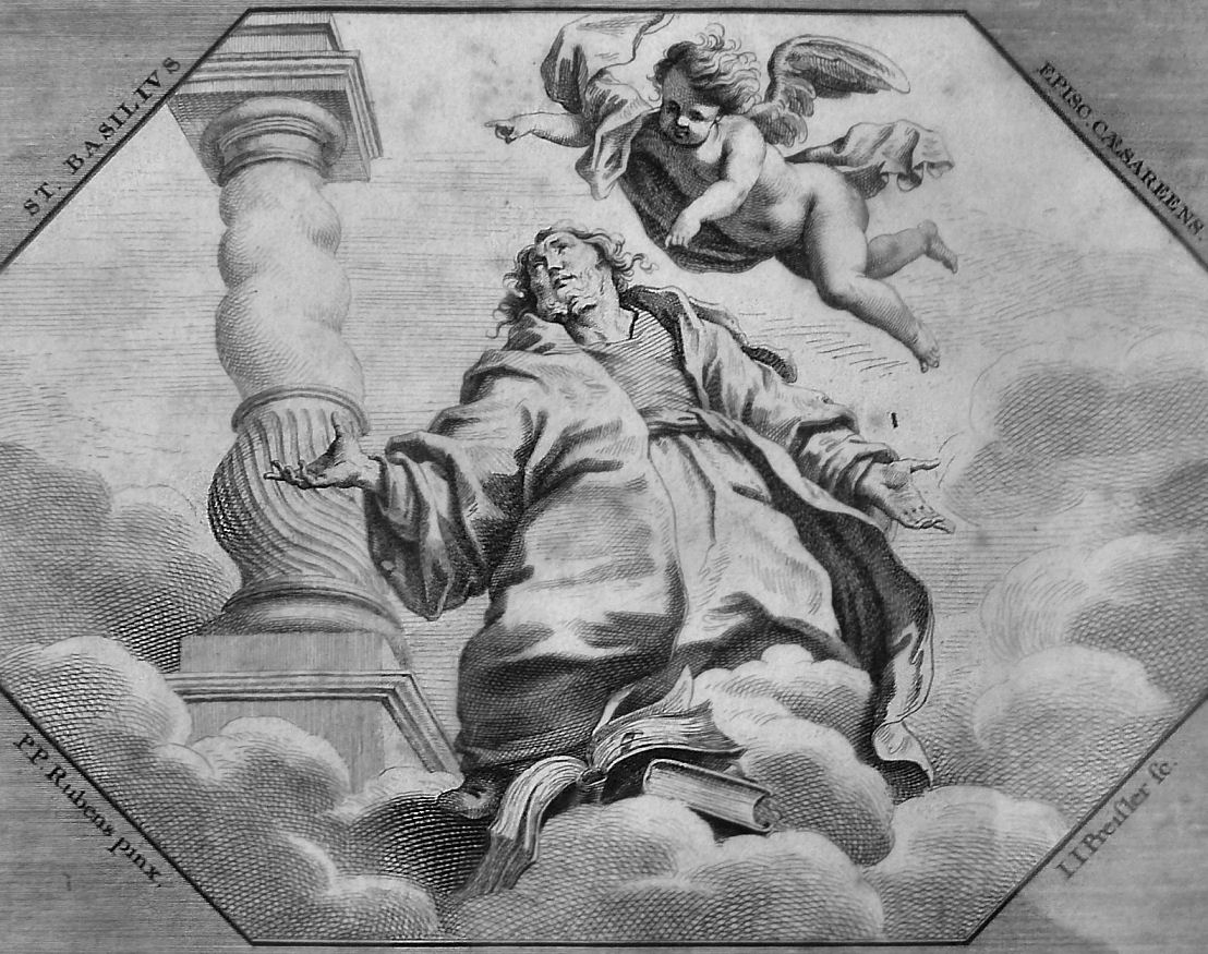 Gallerij Altaar s Hvberti/RVBENS PINXIT S BASILIO